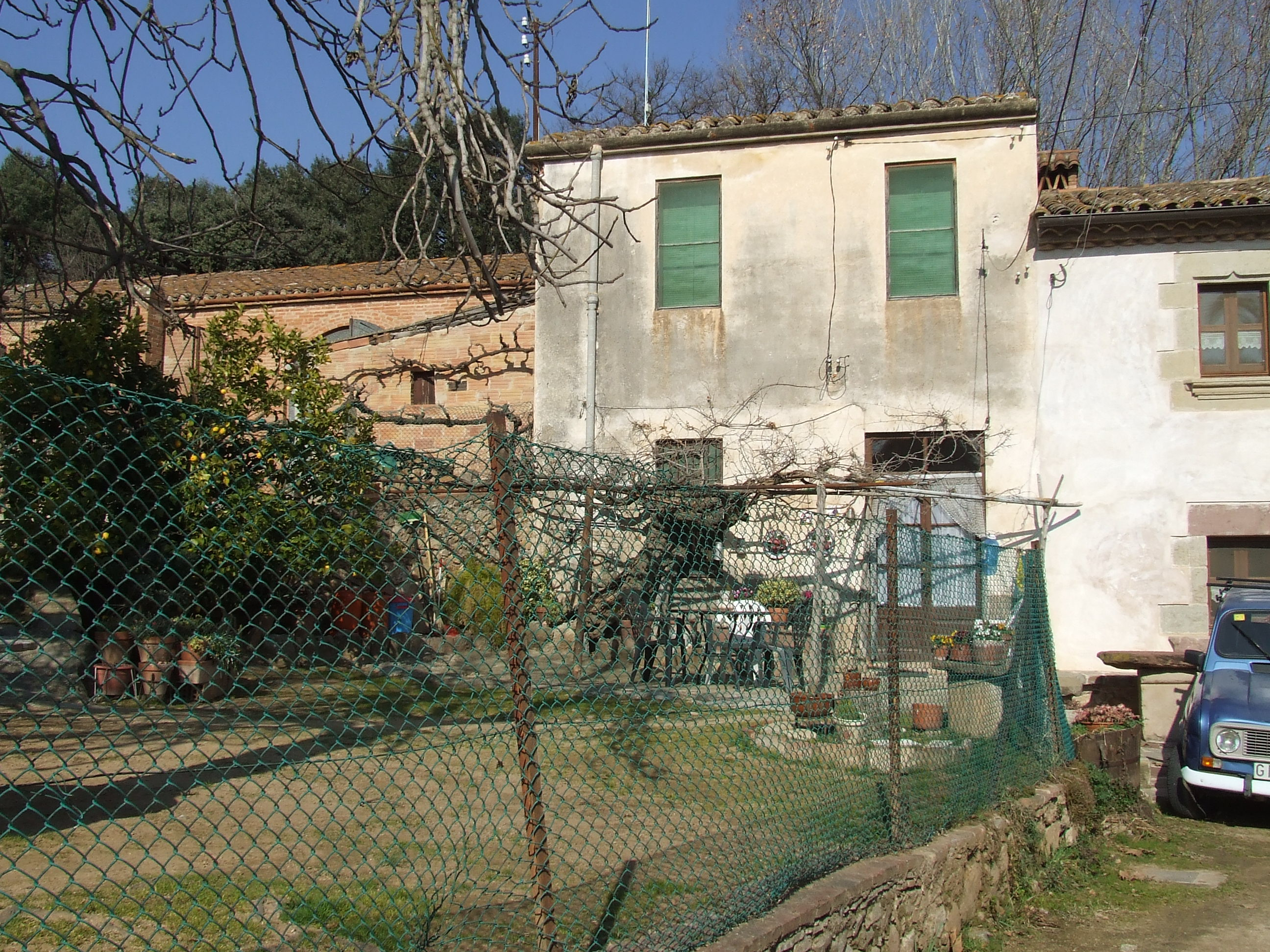 Can Molina (Bigues, Bigues i Riells, Vallès Oriental)